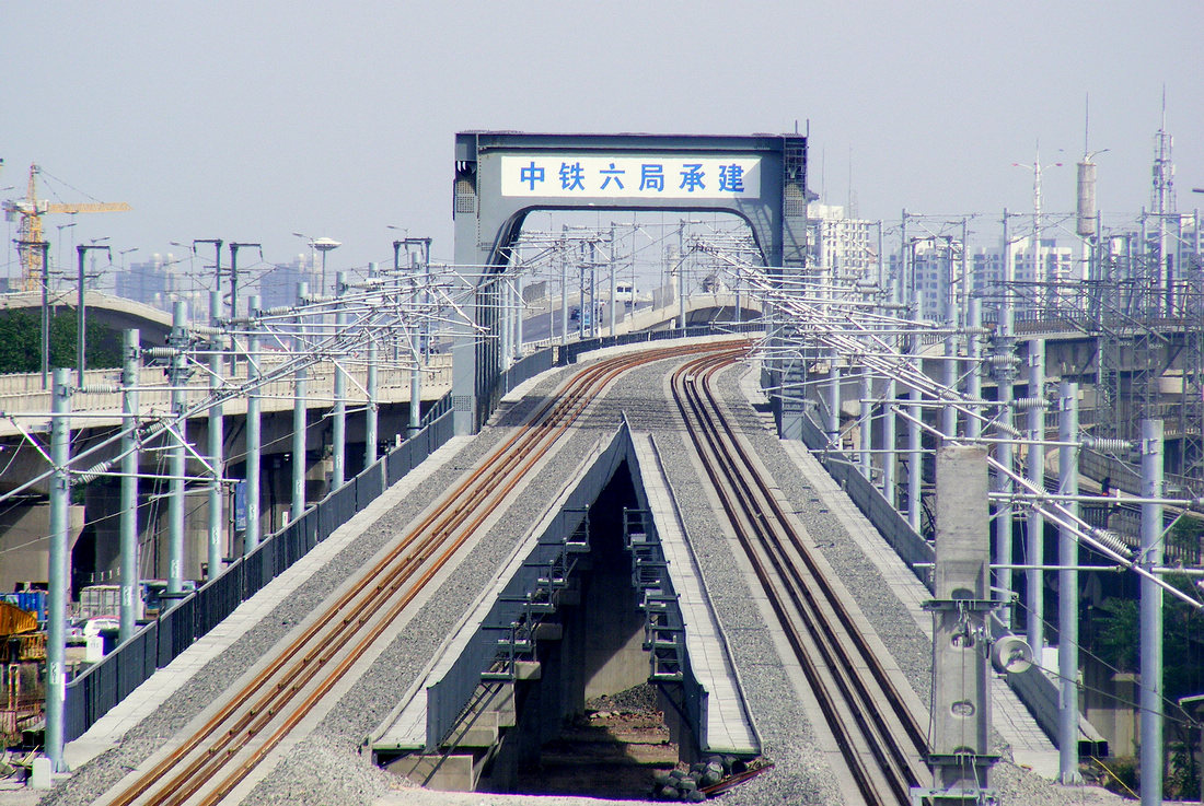 京津城际铁路南仓特大桥